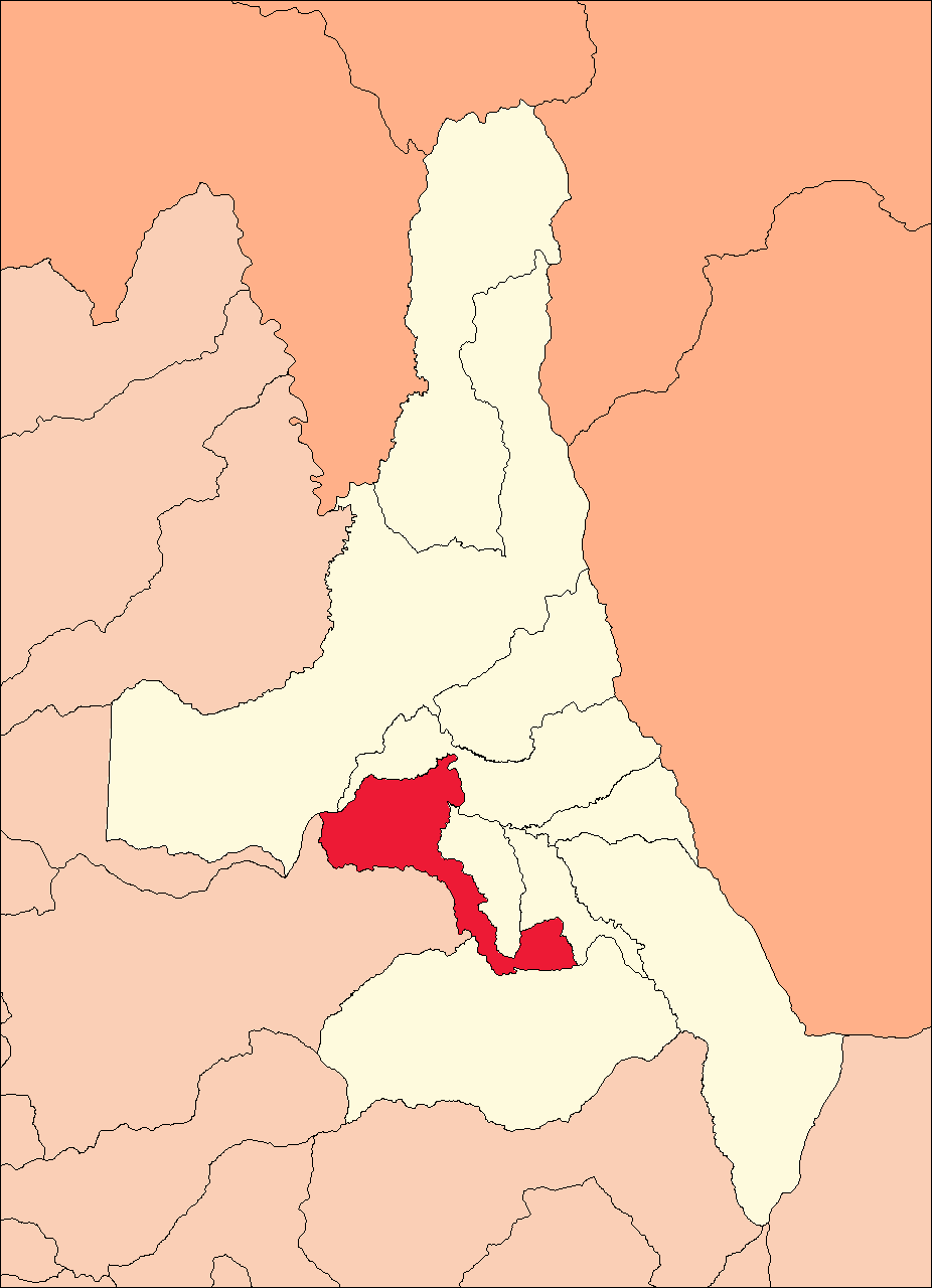 Área del distrito de Rupa-Rupa.